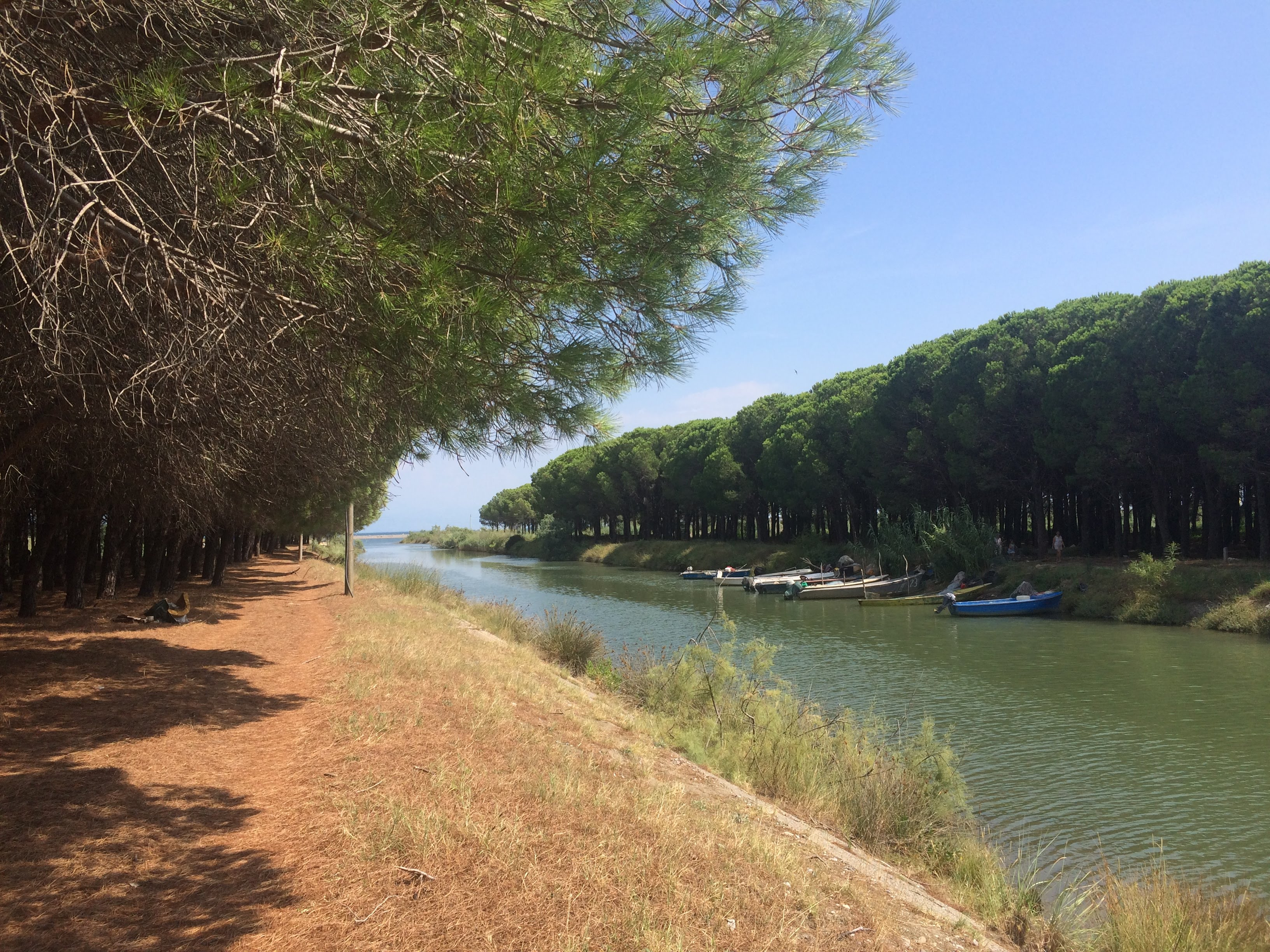 Lumi Buna-Veiipoje, Shkoder